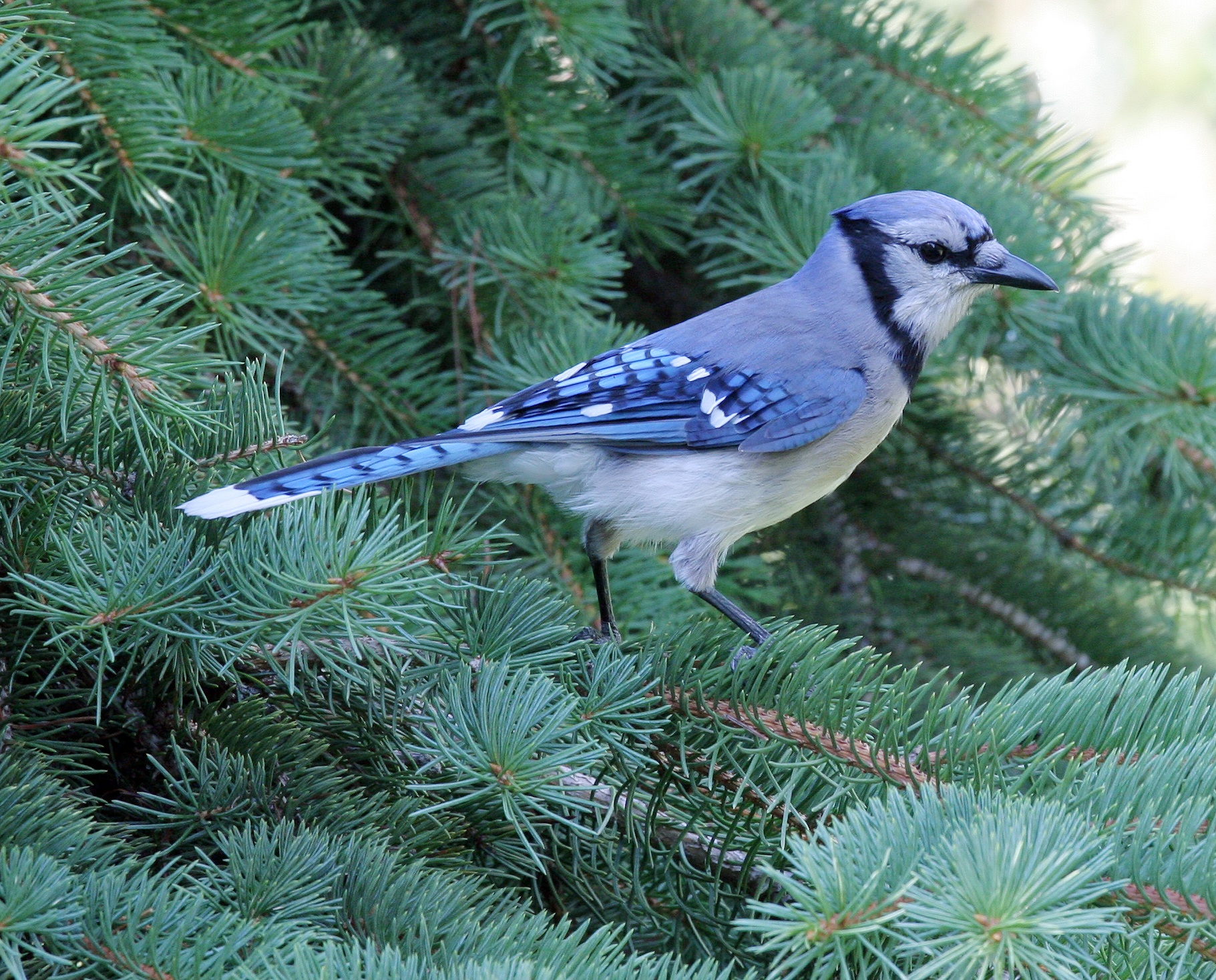 Blue Jay (Cyanocitta cristata)